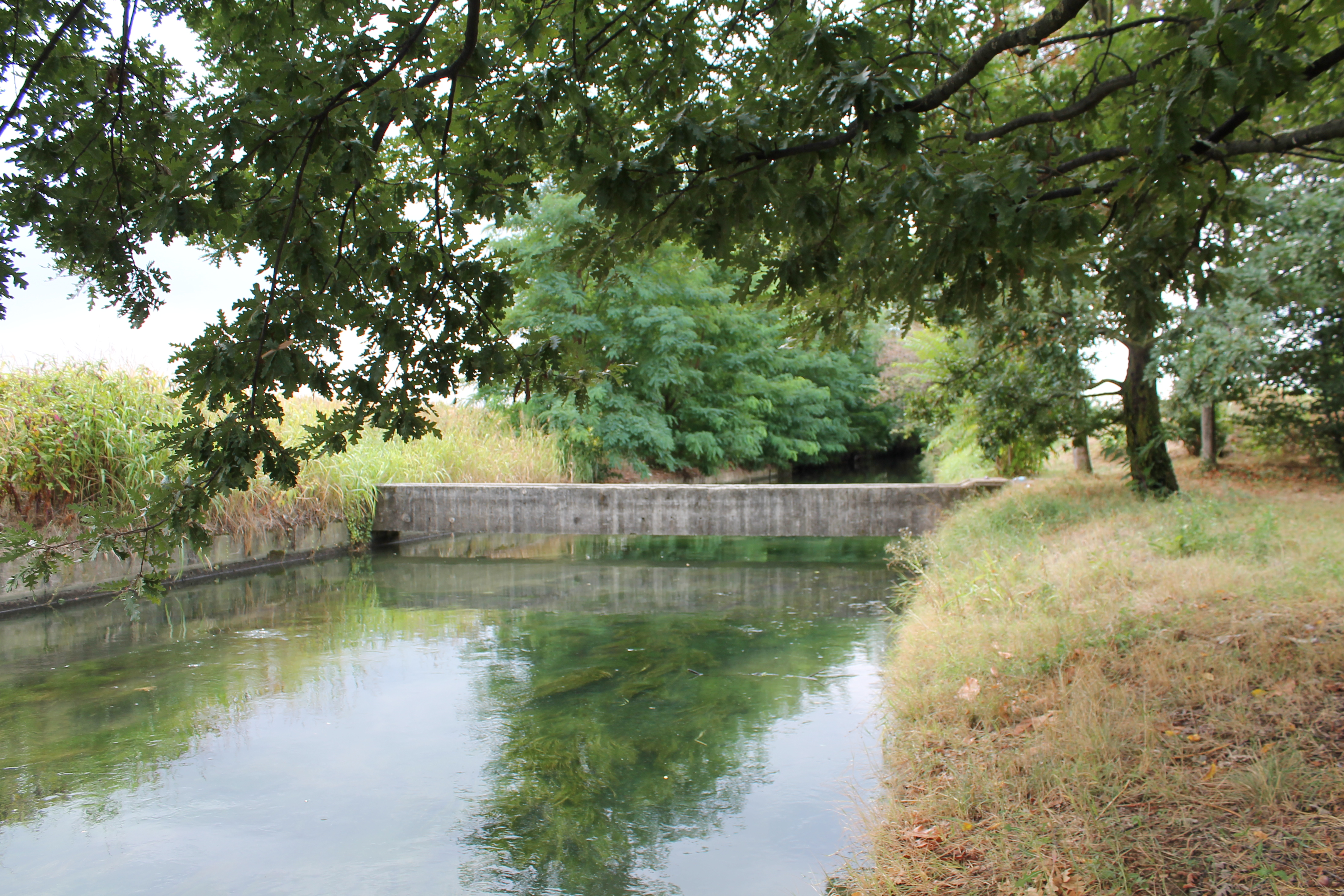 Canale della Seriola a Castelcovati, BS.